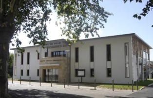 Maire de Labenne